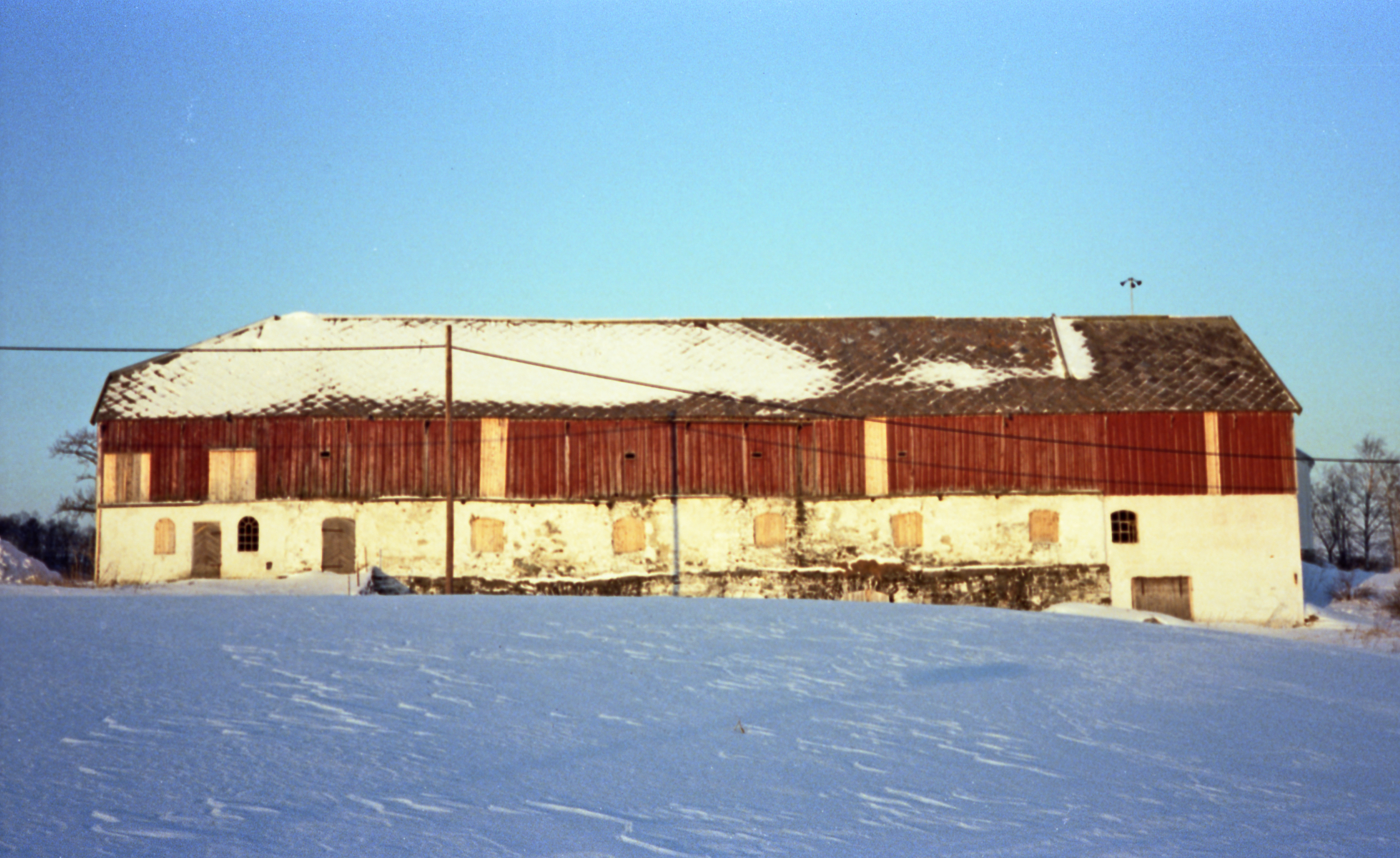 Format: 35 mm farge negativ Film: Kodak Safety Film, KodaColor II Dato / Date: Ukjent Fotograf / Photographer: Ukjent Sted / Place: Dragvoll gård, NTNU, 7049 Trondheim (Gnr. 48/53) WikiStrinda: Dragvoll gård Google Maps: bit.ly/y3mR7D Street View: bit.ly/yBRjwe Eier / Owner Institution: Trondheim byarkiv, The Municipal Archives of Trondheim Arkivreferanse / Archive reference: Tor.H43.P1.F5432, film 22 Merknad: Fra Byantikvarens negativsamling. Tilhørte erkebiskopen og domkapitlet i middelalderen. 1647 delt mellom kronen og sognepresten i Vår Frue kirke. 1683 tilhørte den Casper Wildhagen, som la til ett av Loholtbrukene. Tilhørte deretter sogneprest Sebastian Withe i Vår Frue kirke, og fra 1736 generalveimester C. O. Lützow. 1739-67 og 1776-1835 tilhørte gården familien Ulfers, deretter salmaker M. Spechmann og fra 1880 slekten Grendahl. Staten overtok Dragvoll på slutten av 1960-tallet og brukte gården til utbygging av Universitetssenteret på Dragvoll. Hovedbygningen er bevart, men låven ble ødelagt av brann i 1981. En ny bygning med samme volum som låven er reist på tomten. [Kilde: Trondheim Byleksikon 2008] Dragvoll gård, Trondheim, Norway